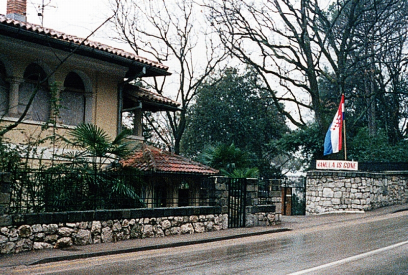 Natpis na ulazu u bivšu "Mamulinu vilu" u Opatiji nakon što je iz nje iselio 1991